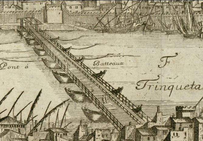 Vue d’Arles en 1660 (détail). Pont sur le Rhône entre Arles et Trinquetaille.